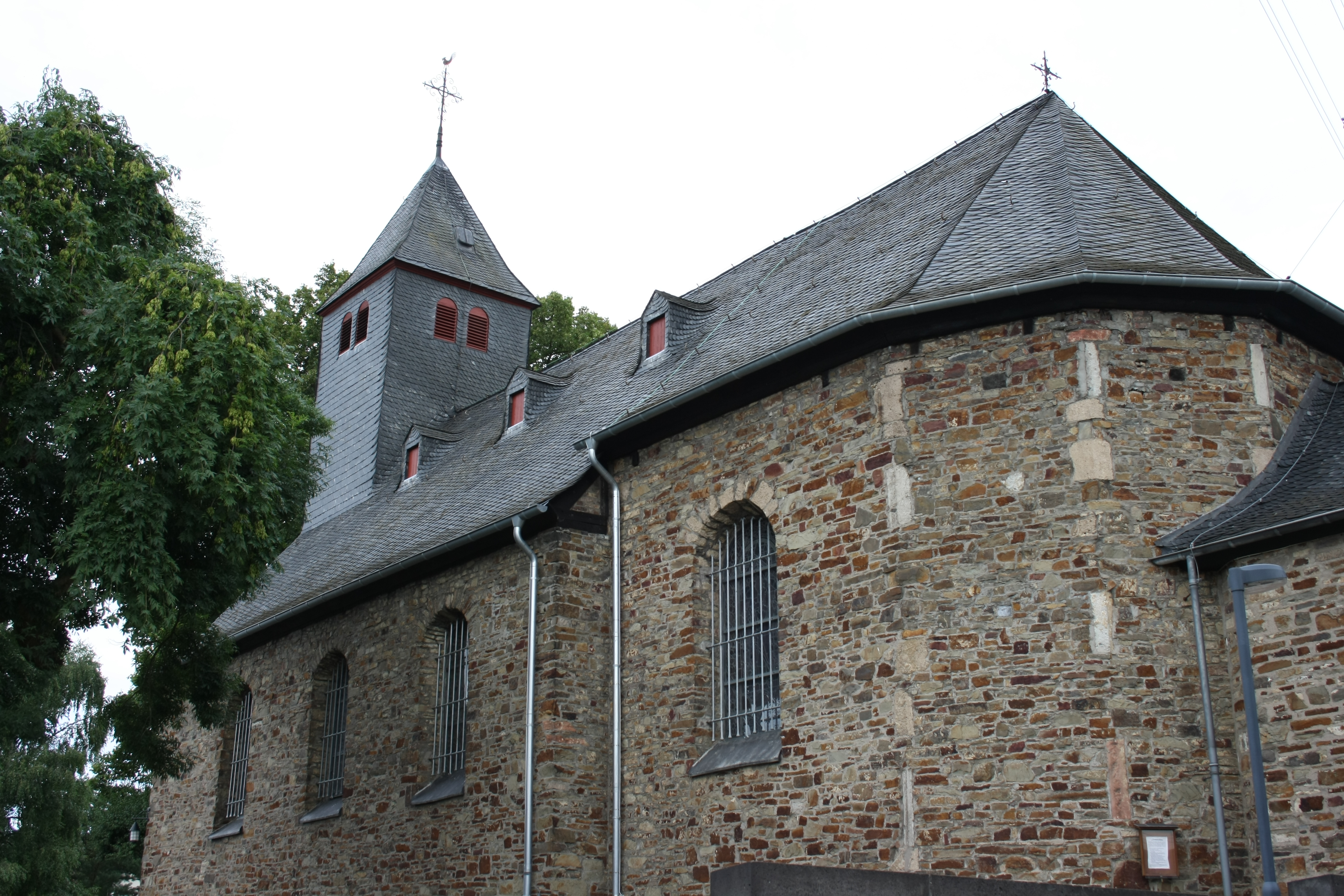 katholische Kirche St. Martin in Hilberath, Ortsteil von Rheinbach